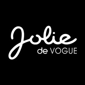 jolie